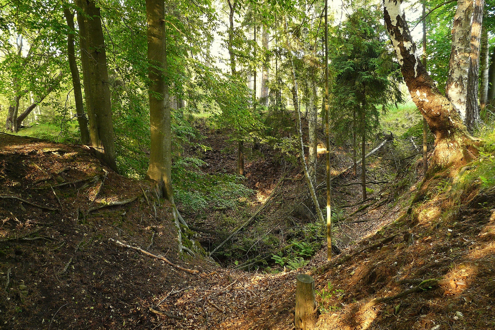 Opuštěný lom na Židlovské horce